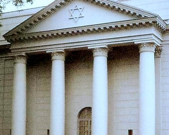 Синагогу "Золота Роза" у Дніпропетровськ